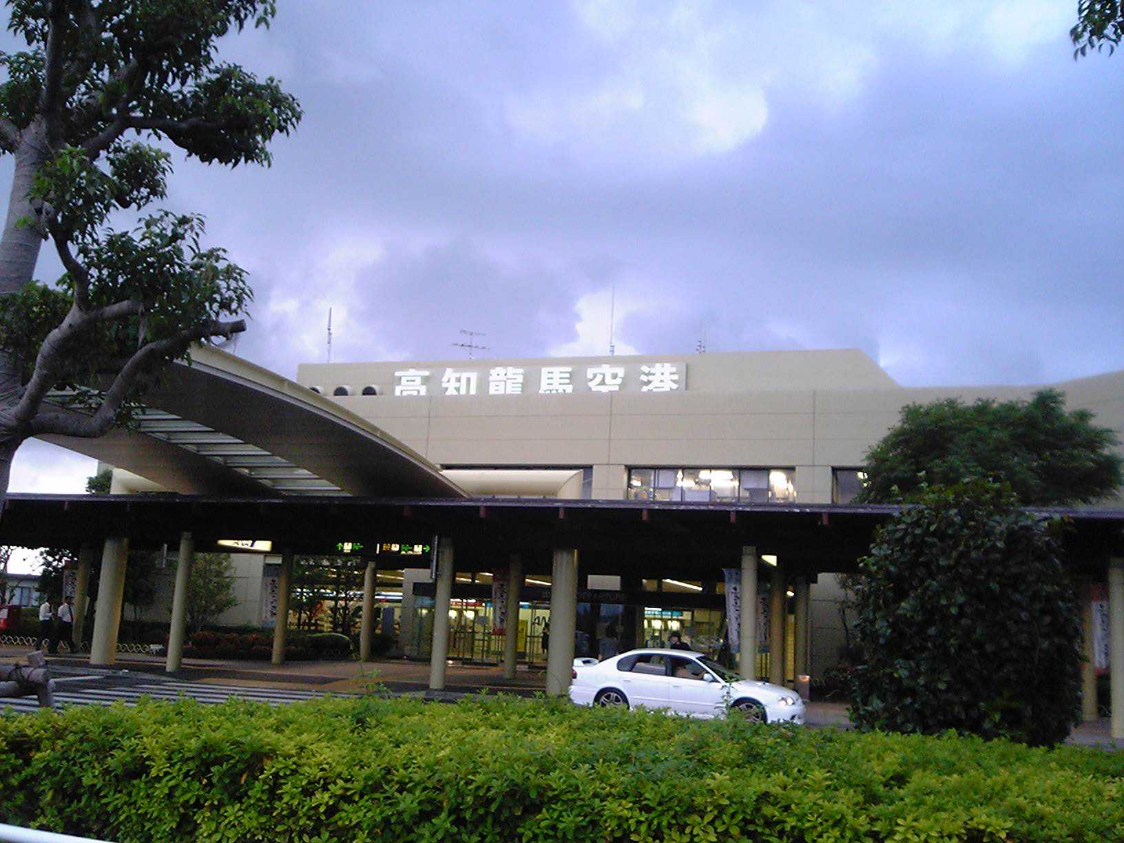 高知竜馬空港（2006年10月2日投稿者が撮影）